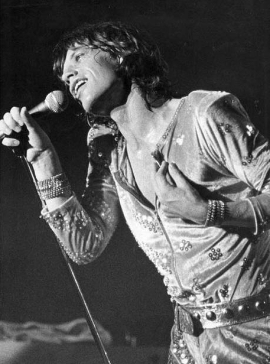 Entertaineren Mick Jagger fra gruppen The Rolling Stones som giver koncert i Vejlby-Risskov-Hallen. Fra dato